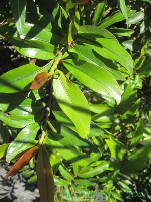 Erythroxylon laurifolium